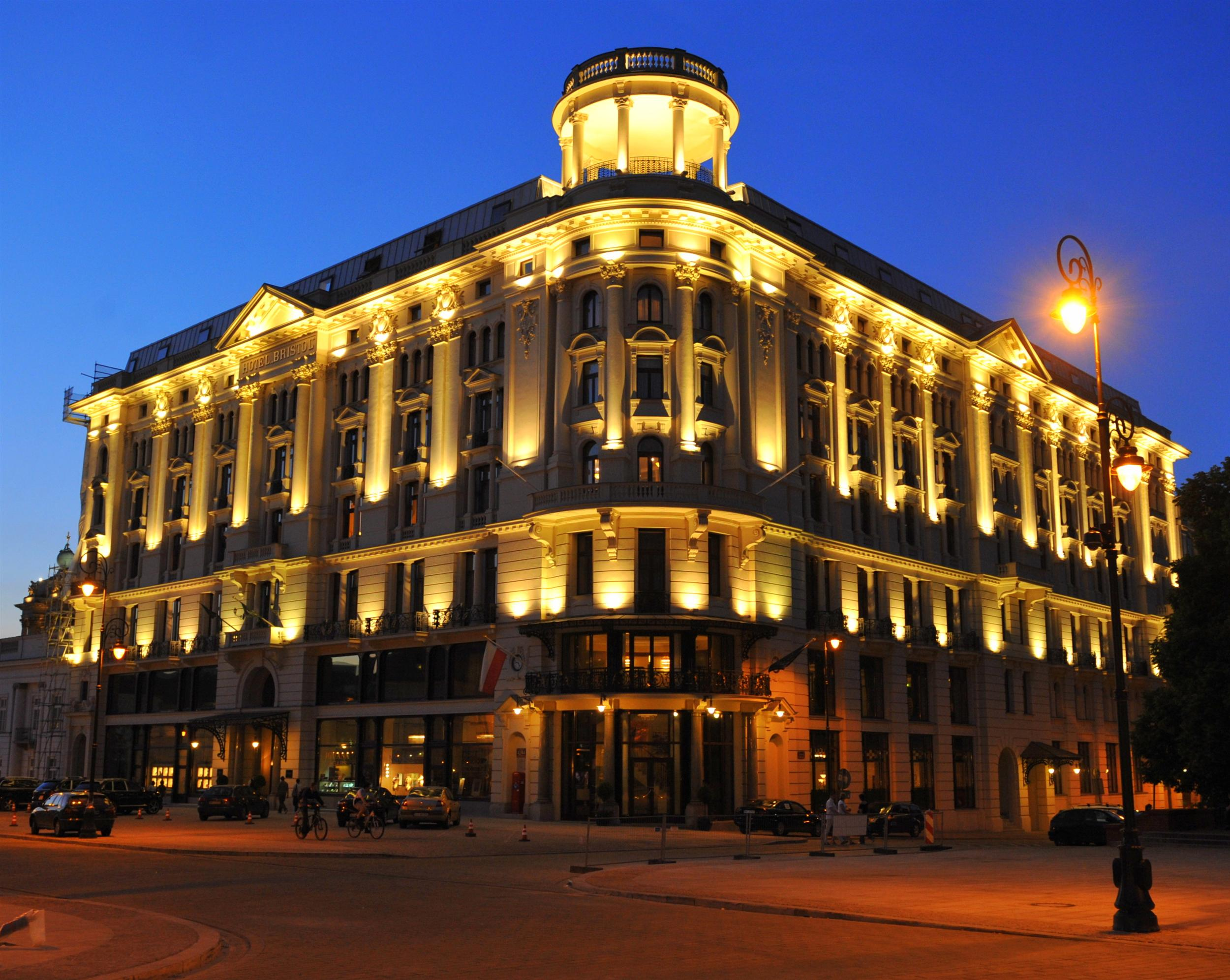 Wieczorna iluminacja Hotelu Méridien Bristol w Warszawie